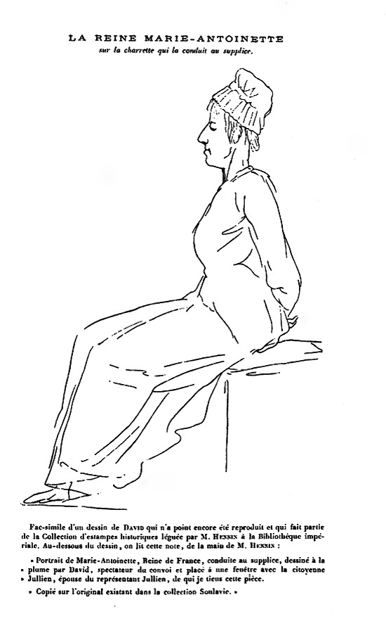 Célèbre croquis. Mais version étendue. Le texte authentique la paternité du dessin à la plume par Jacques-Louis David.